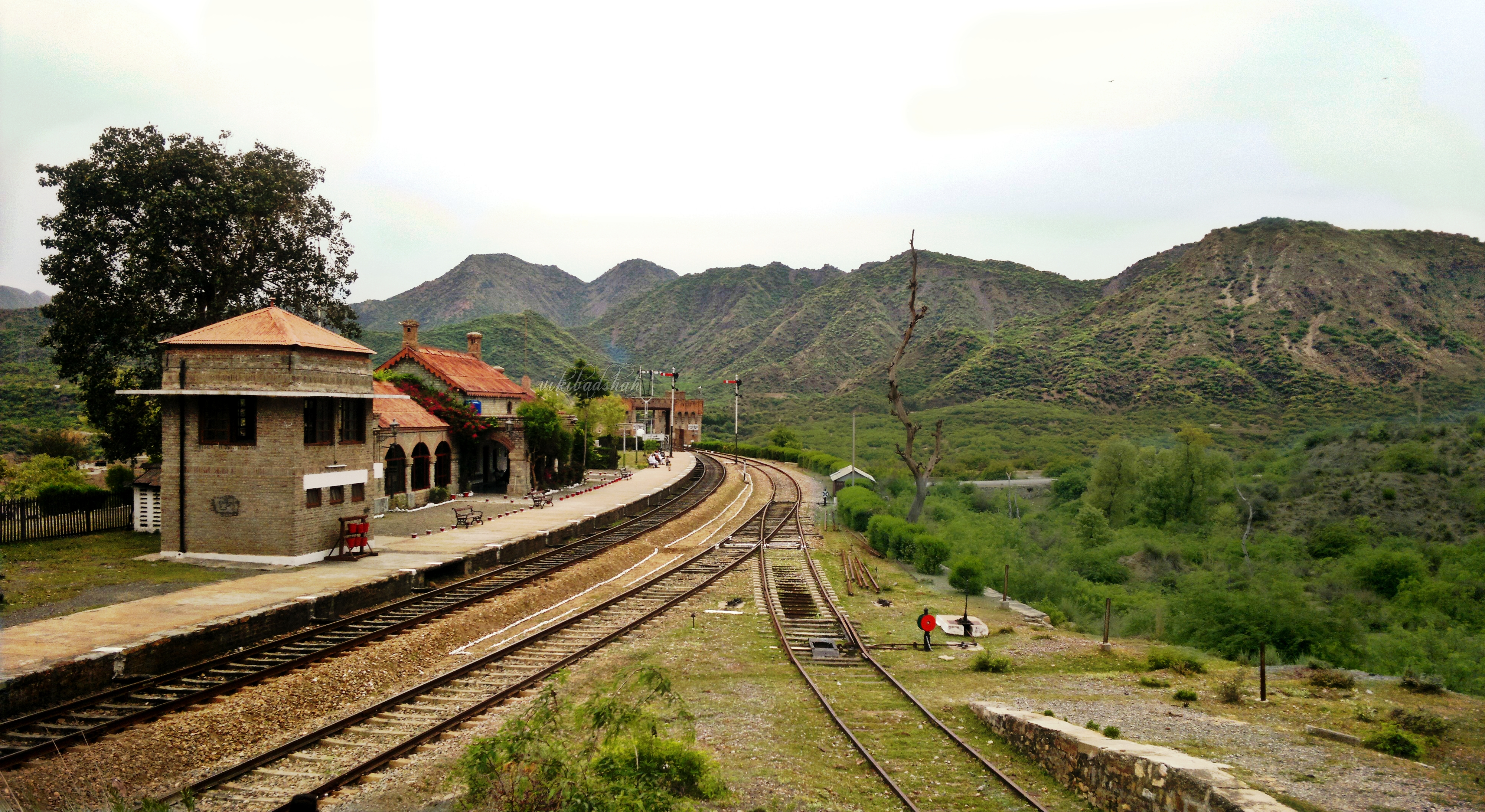 Hazro Tehsil, Pakistan